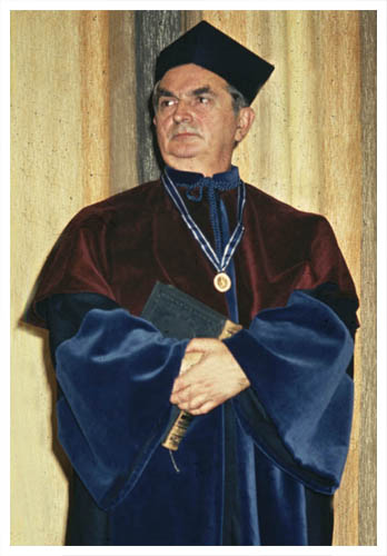 Portret prof. Wojciecha Roeske